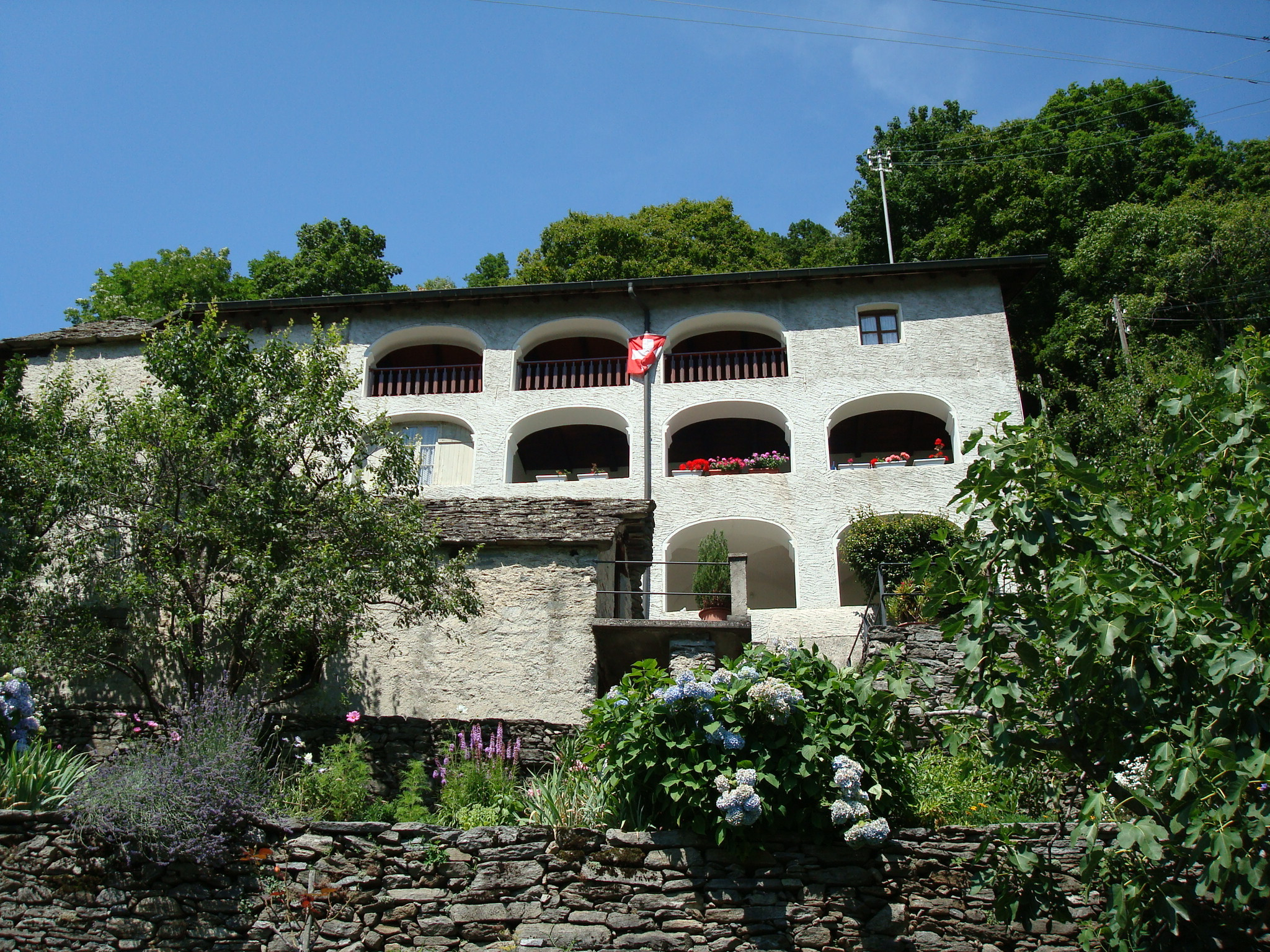 Casa tradizionale del XVI secolo, tra le più belle della Valle Onsernone